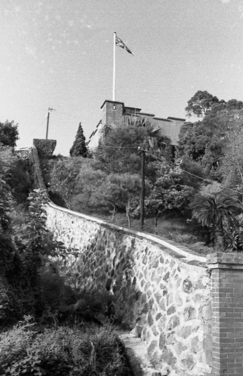 中文（台灣）: 紅毛城（被英國作領事館使用，自1861年至1972年3月），臺灣淡水。